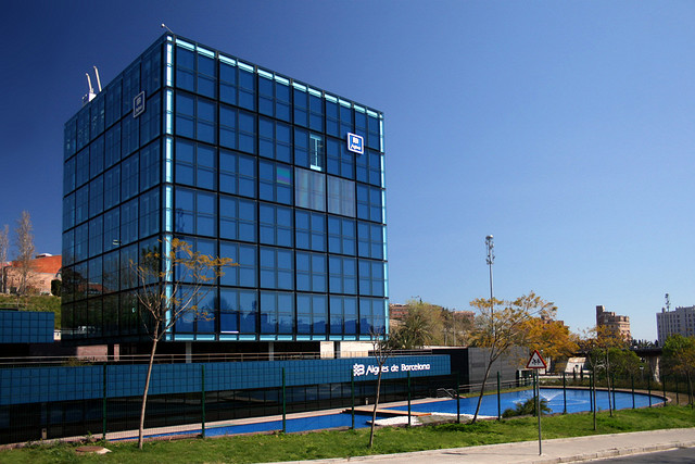 Edifici Aigües de Barcelona a l'avinguda d'Albert Bastardas, Collblanc, Barcelona. Arquitecte: Leopoldo Rodés i Parés